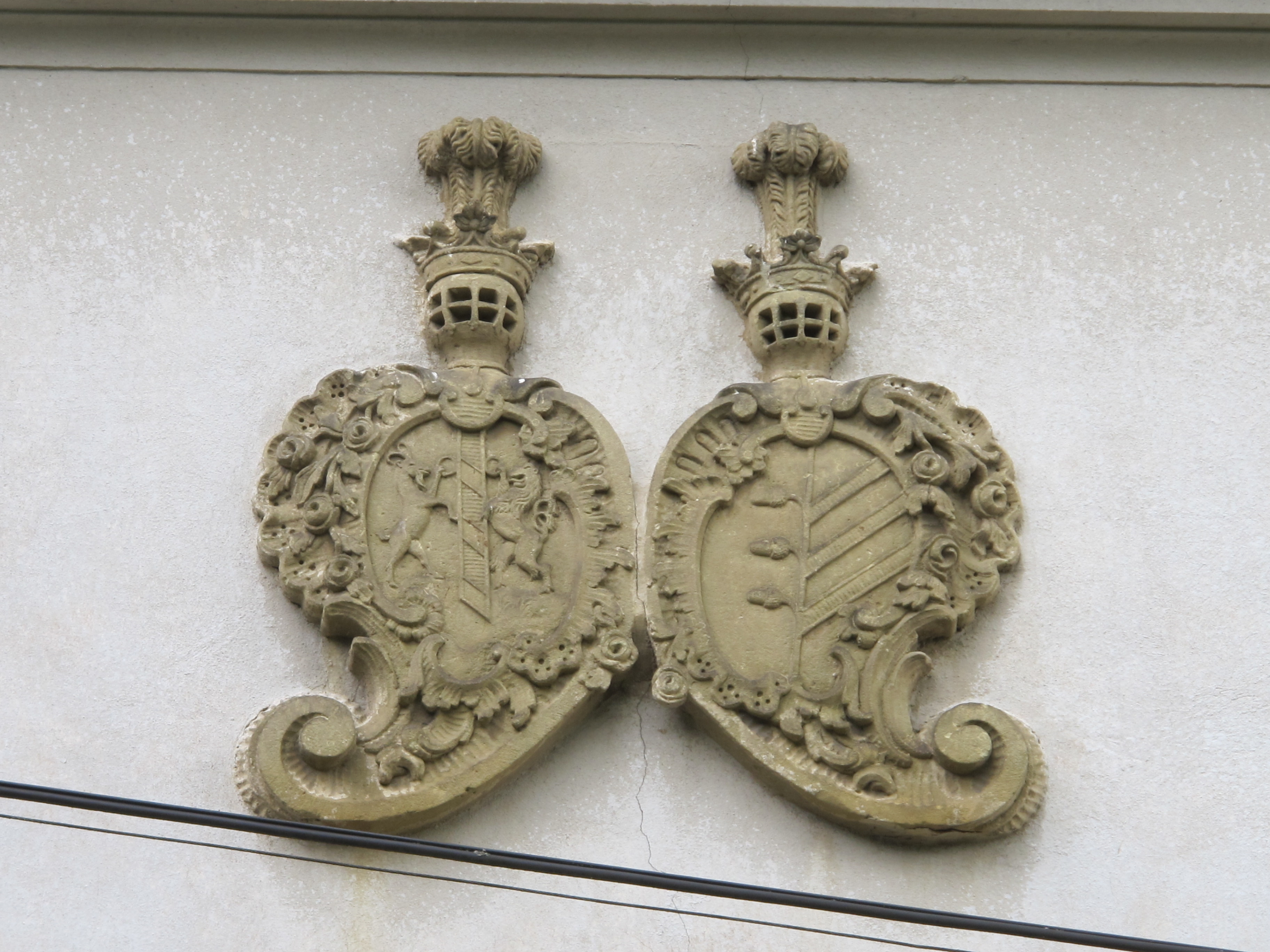 Rokokový kostel svatého Martina, Zámrsk.